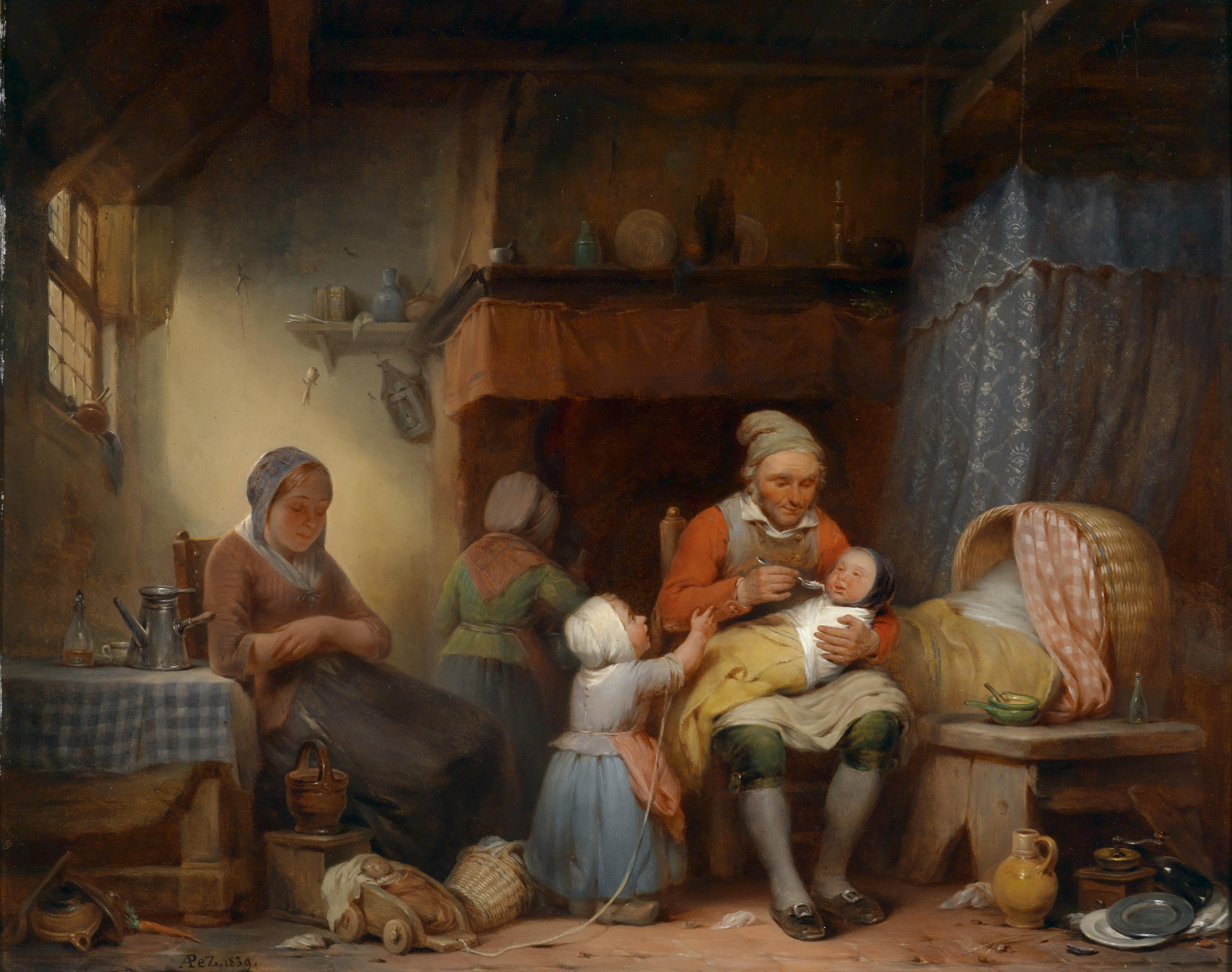 Familienidyllelabel QS:Lde,"Familienidylle"